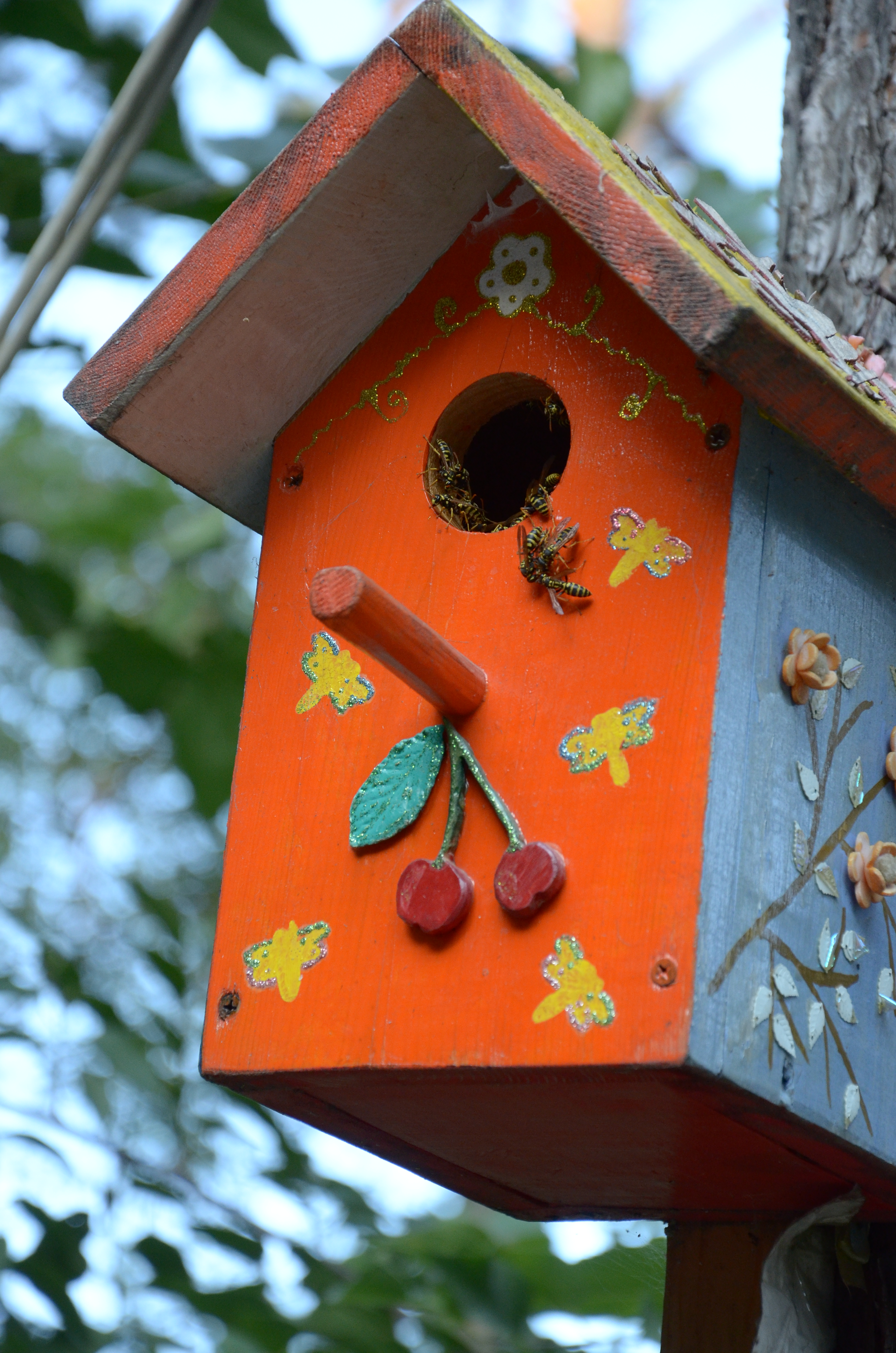 Сафари-парк в Краснодаре